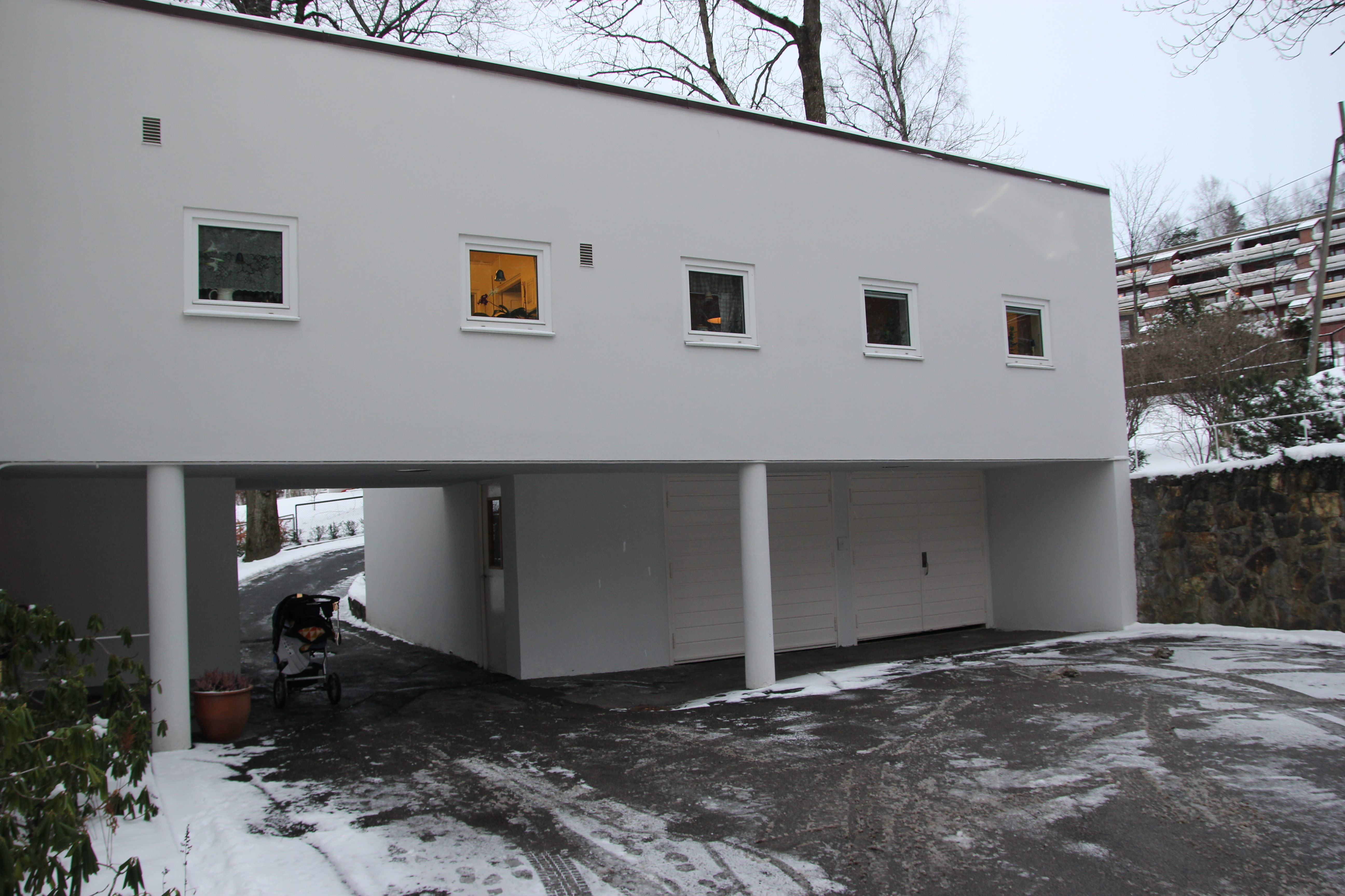 Villa Ditlev-Simonsen, tjenerfløy